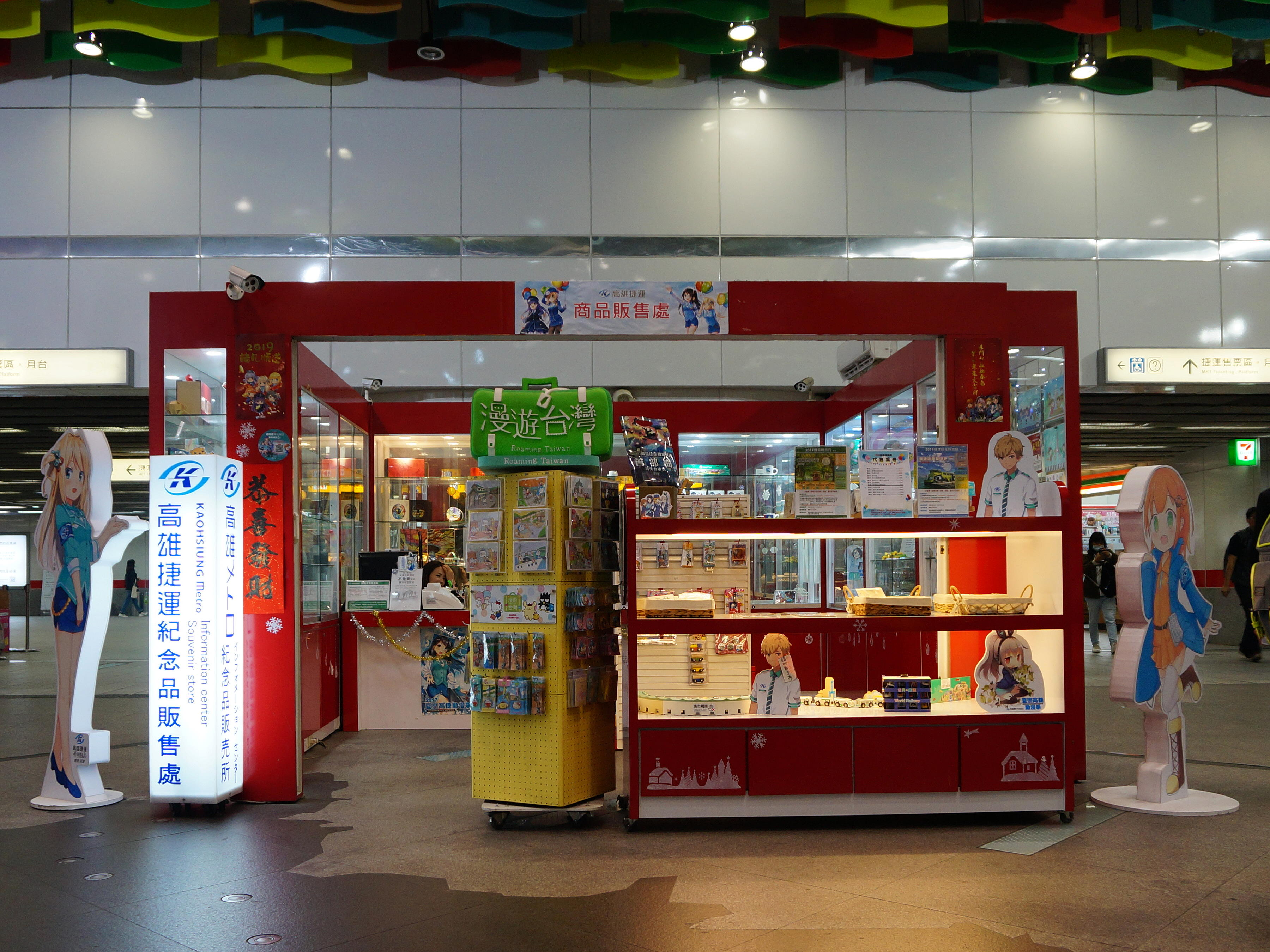 高雄捷運左營站旅遊諮詢處，也是高雄捷運紀念品販售處。